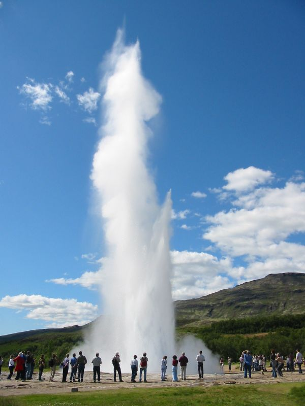 Strokkur, a geysir in Iceland